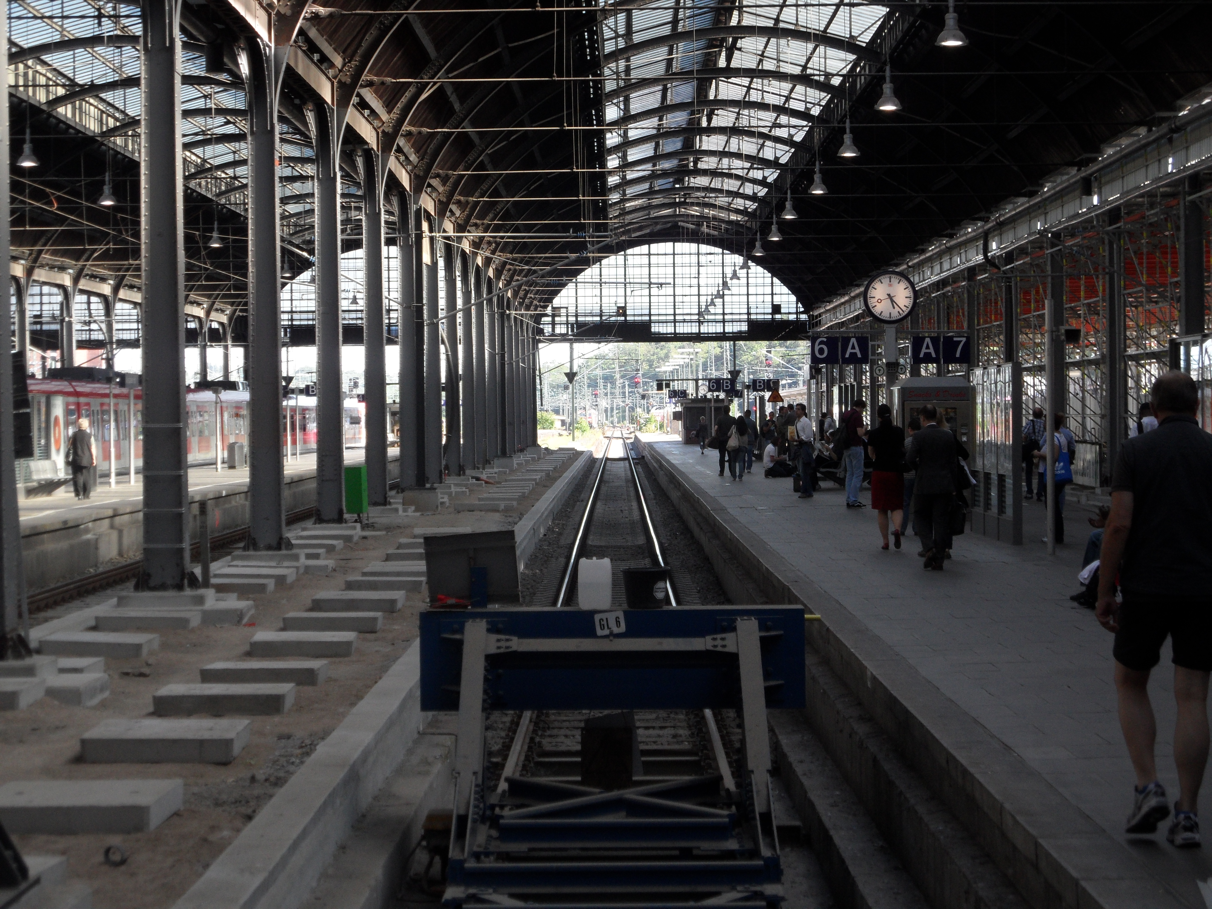 Wiesbaden Hauptbahnhof